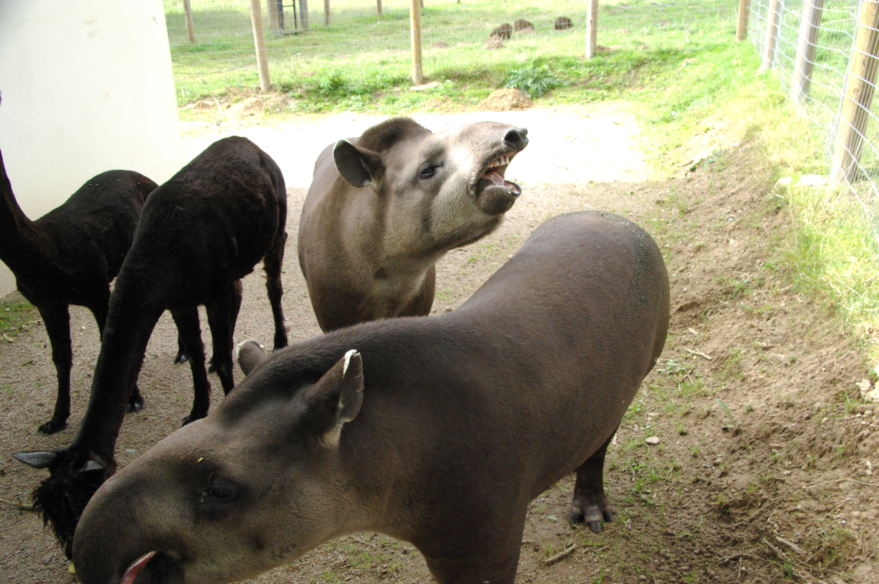 tapirs